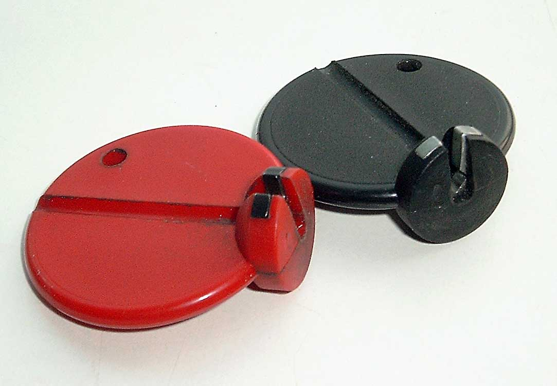 runde Nippelspanner